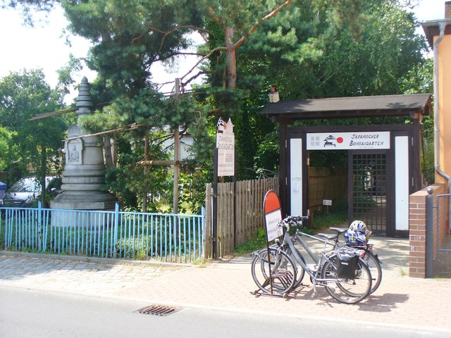 Ferch-Mittelbusch - Japanischer Bonsaigarten (Japanese Bonsai Garden)